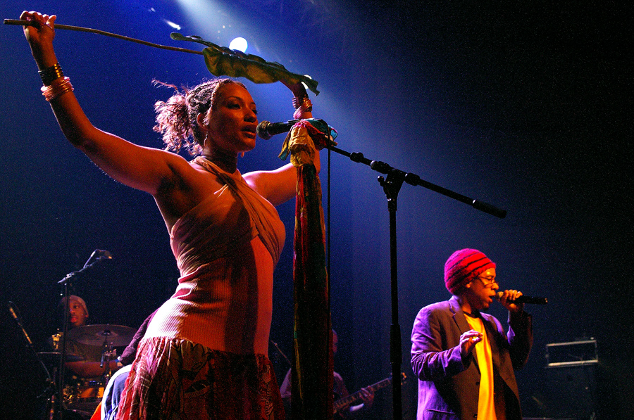 Arrested Development en concert au Het Depot